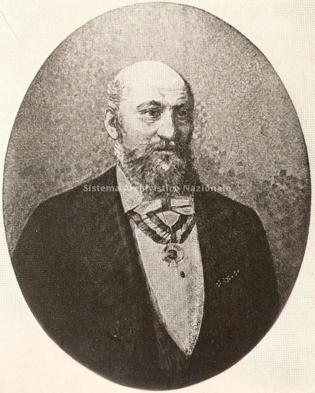 Ritratto in mosaico di Antonio Salviati, imprenditore vicentino fra i principali artefici della rinascita del vetro veneziano, 1890s